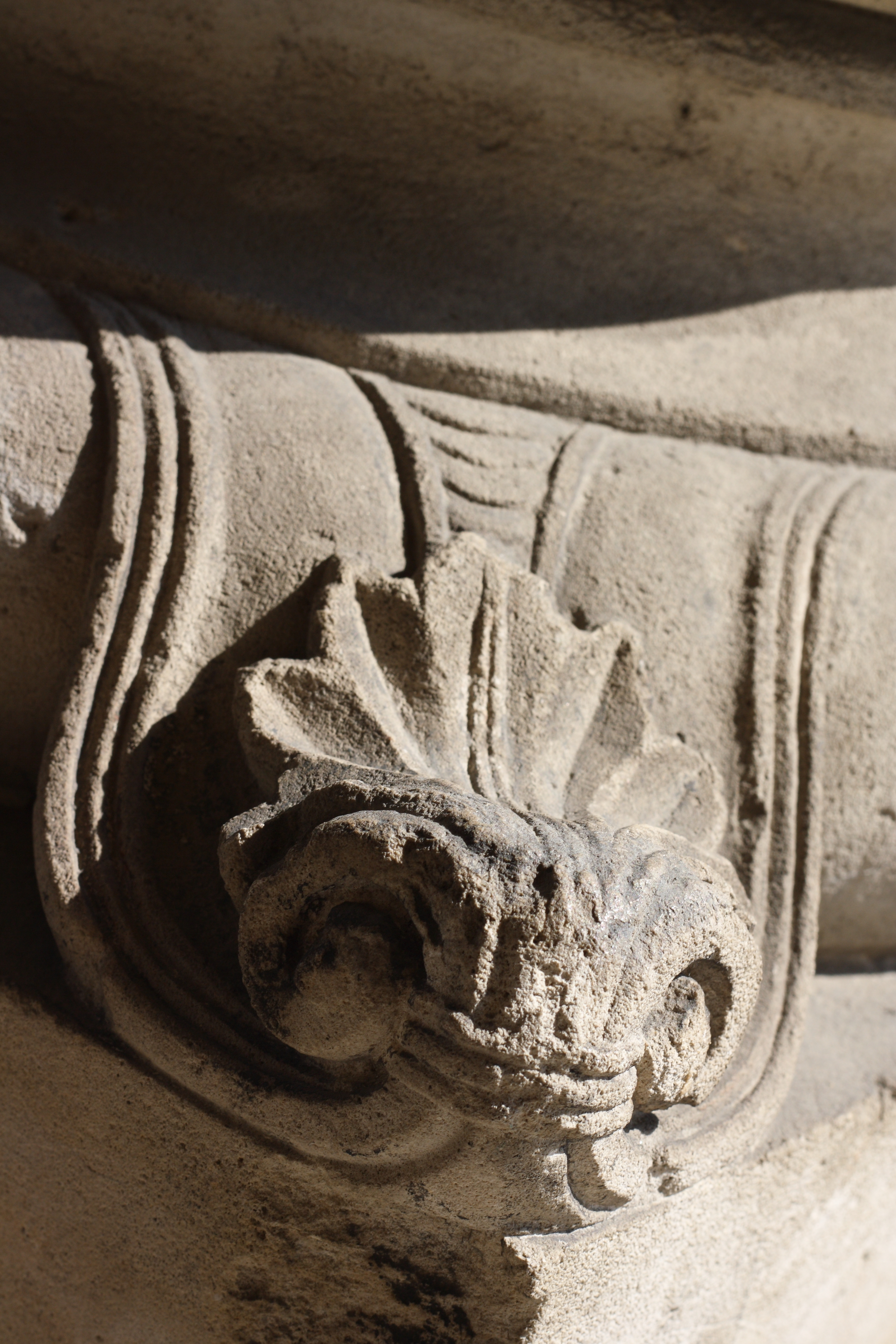 Basilique Saint-Denys in Argenteuil